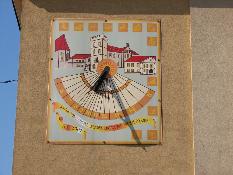 Wodzisław Śl., zegar słoneczny na kamienicy na Rynku